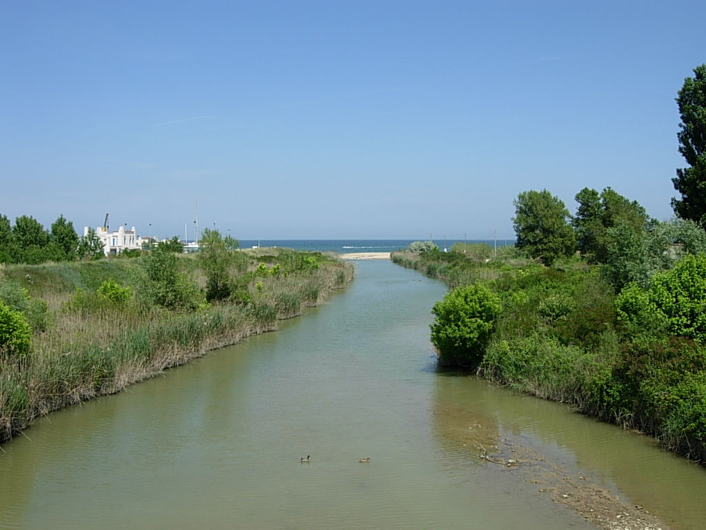 Foce del fiume Conca a Portoverde (Misano Adriatico)